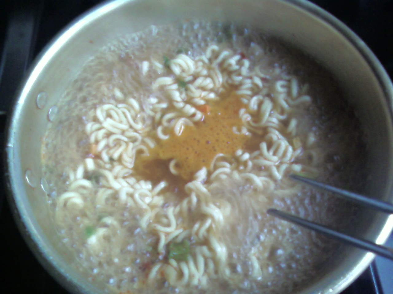 인스턴트 라면을 끓이는 장면